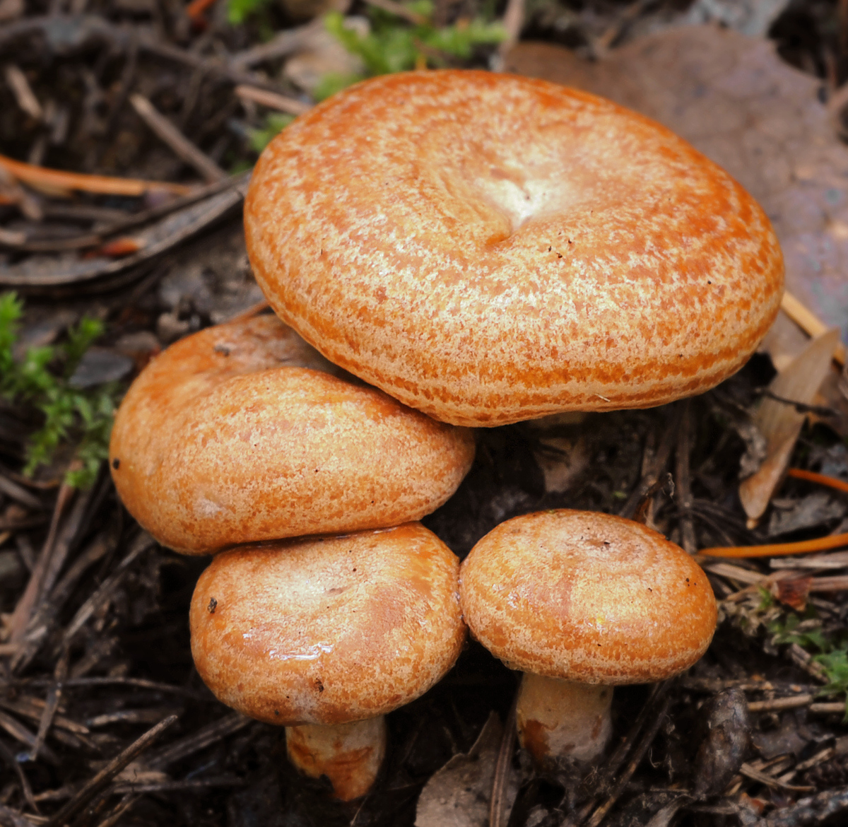 Lactarius deliciosus group